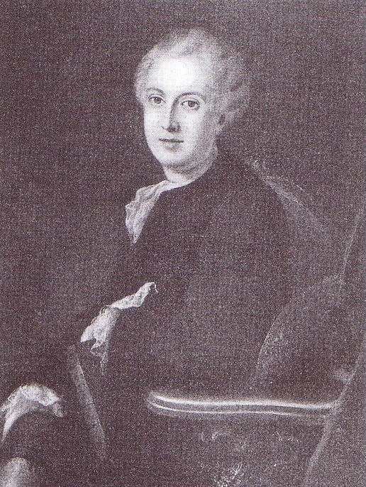 Porträt des jungen Charles Étienne Jordan